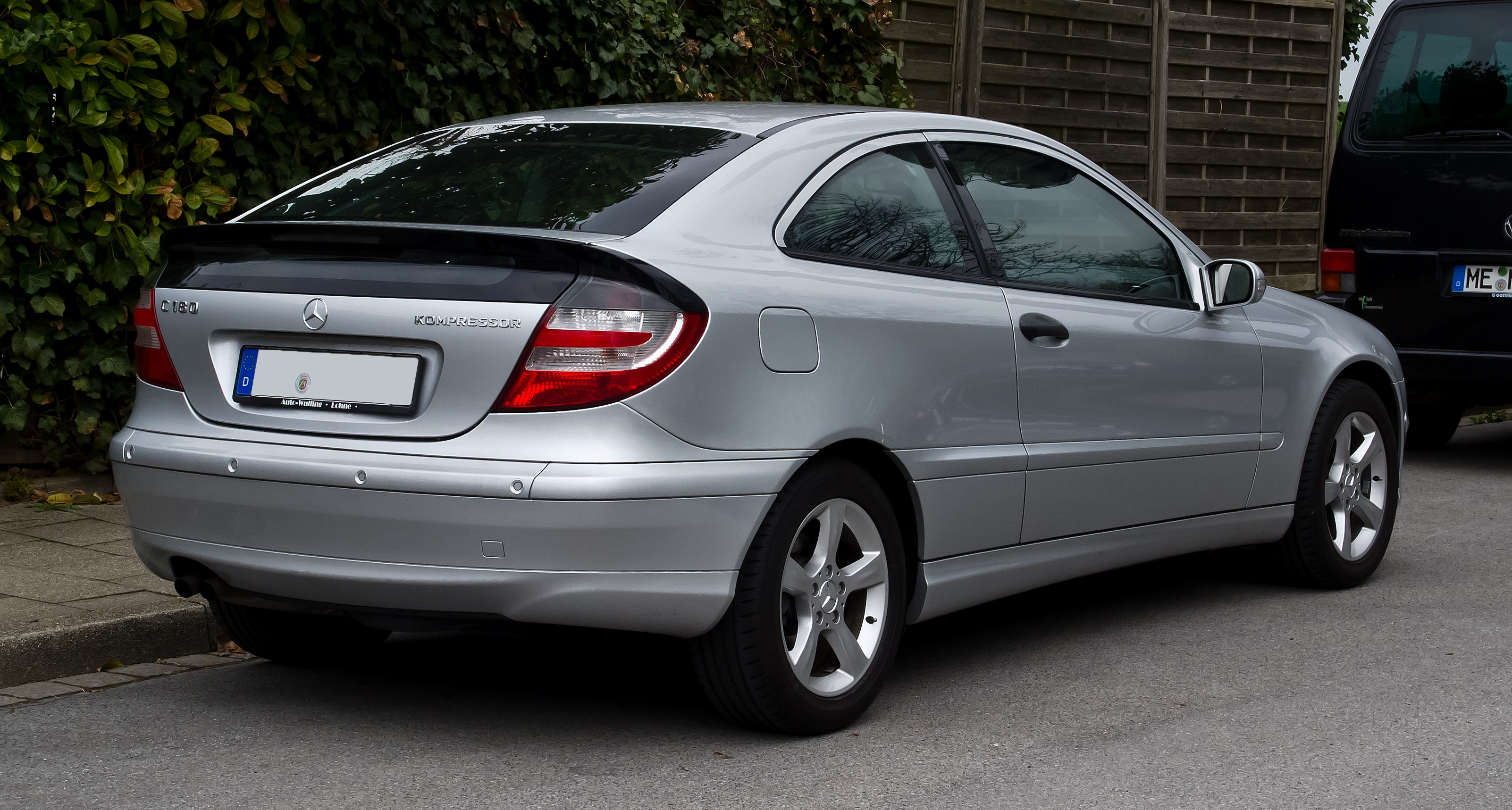 Mercedes-Benz C 180 Kompressor Sportcoupé (CL 203, Facelift)